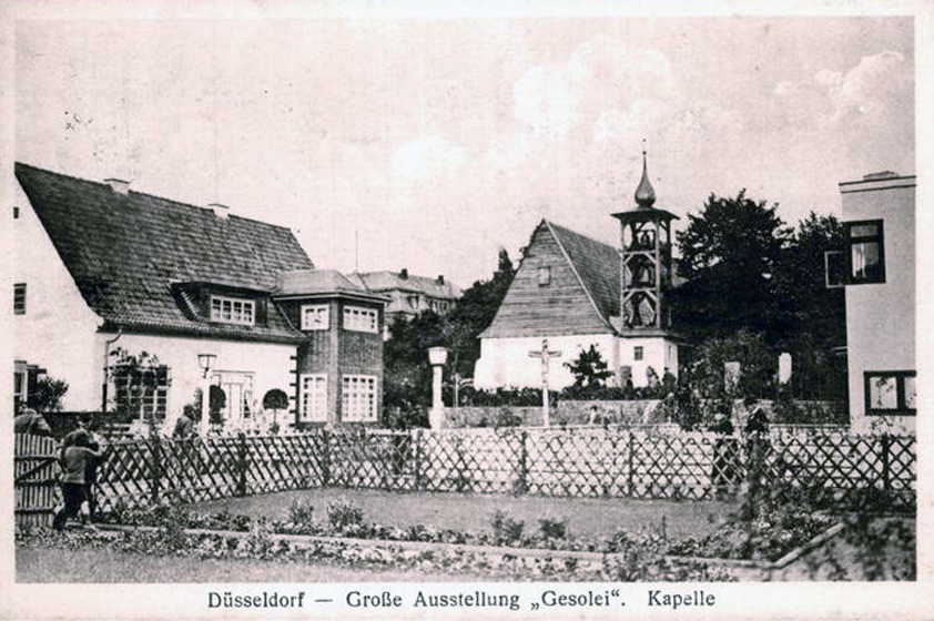 für die GeSoLei erbaute Siedlungskapelle 1925/1926, Architekt Peter Dierichsweiler